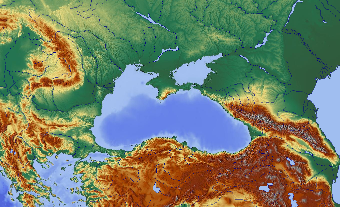 Schwarzes Meer, from